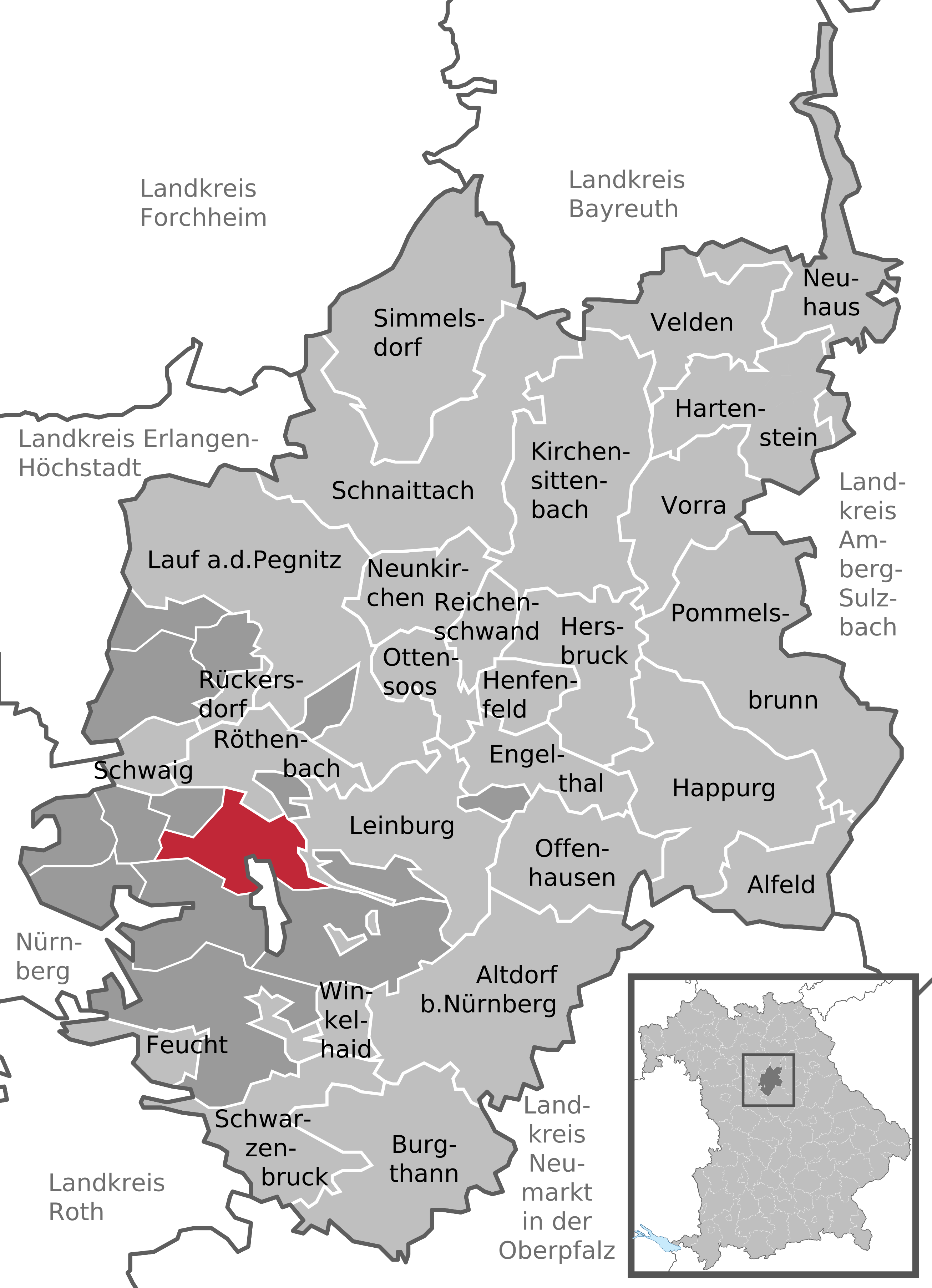 Positionskarte des gemeindefreien Gebietes Brunn